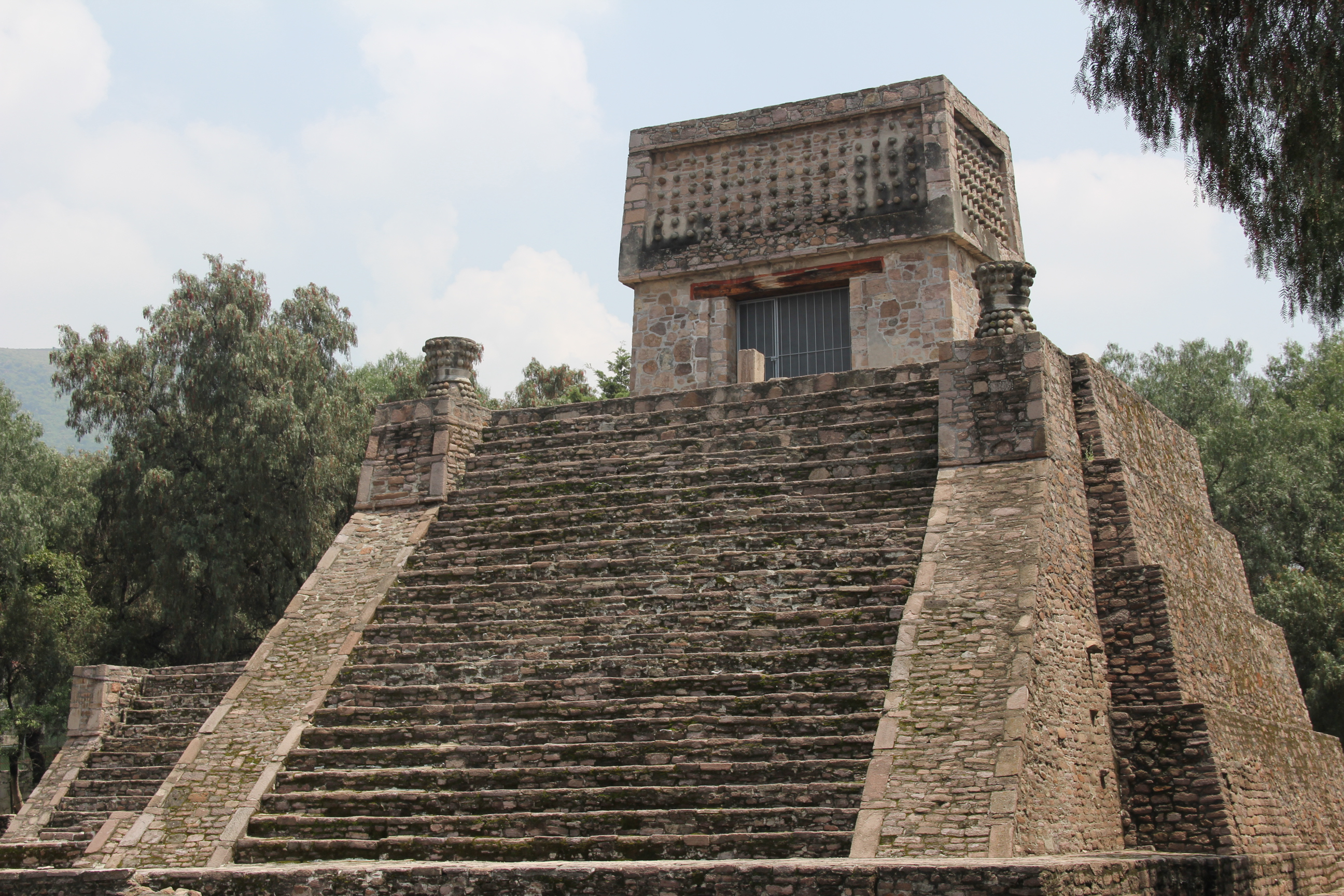 Pirámide del segundo periodo constructivo, dedicada a Huitzilopochtli.